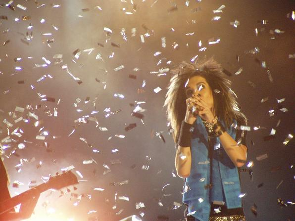 фото Билла Каулица с концерта в Москве от 27.09.2007 в СК "Олимпийский"